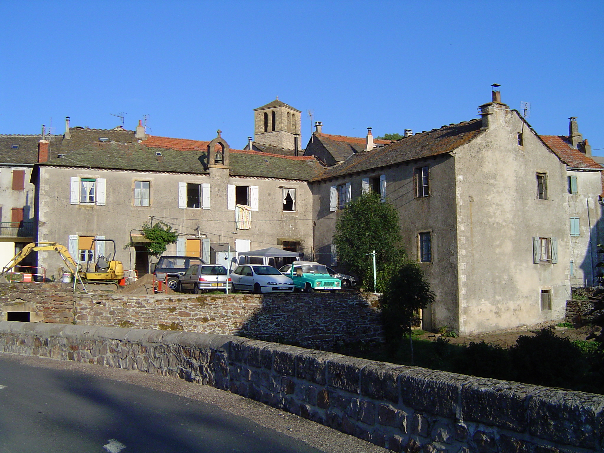 Chasseradès (Lozère, Fr) village, église et clocher de tourmente.